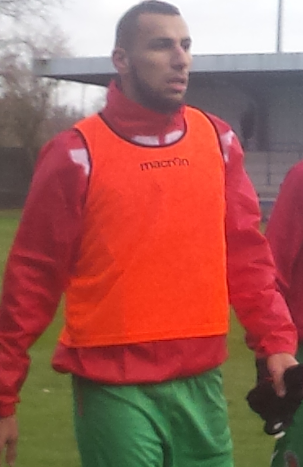 Medhy Guezoui (à gauche) et Romain Armand (à droite) avant le match Lens B - Sedan, au Stade François-Blin d'Avion, match comptant pour le championnat de France de CFA (quatrième division française), le 24 janvier 2015.